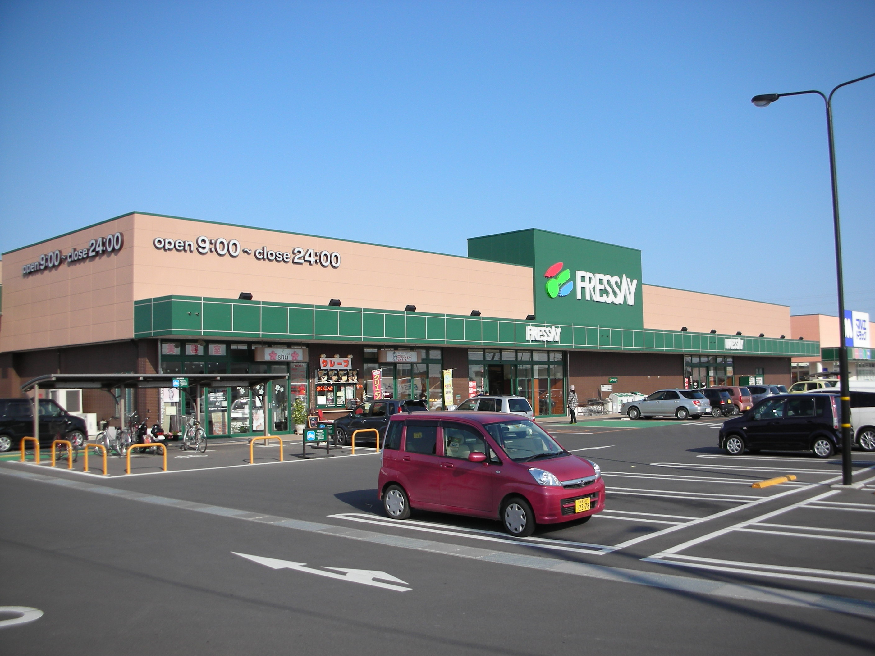 フレッセイ田部井店の外観